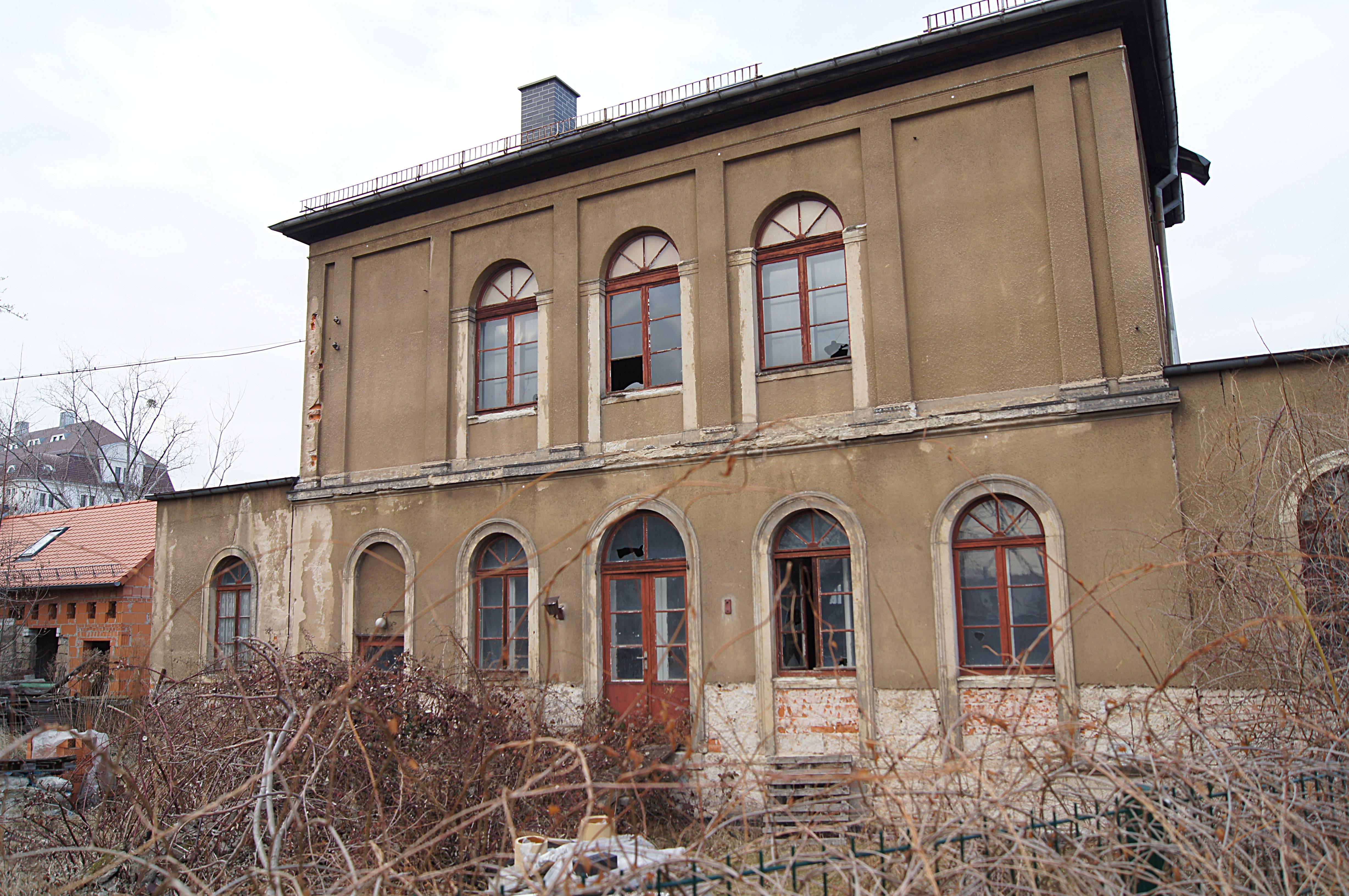 Portikus-Villa Friedrichstraße 62